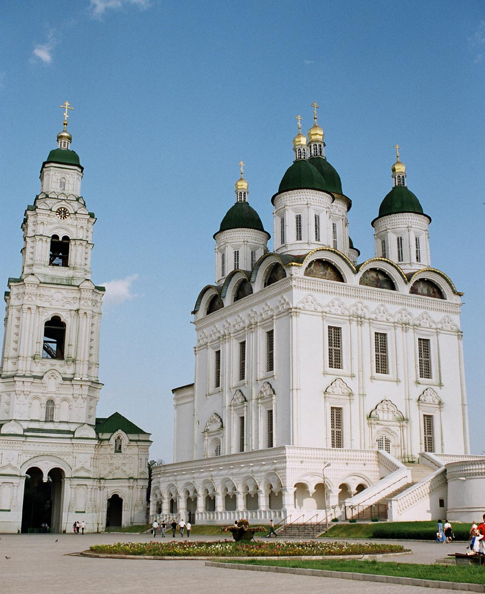 Успенский собор Астраханского кремля